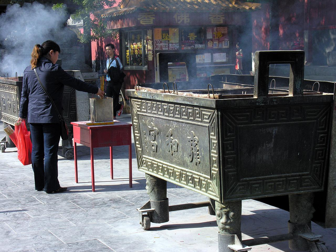 China-6756